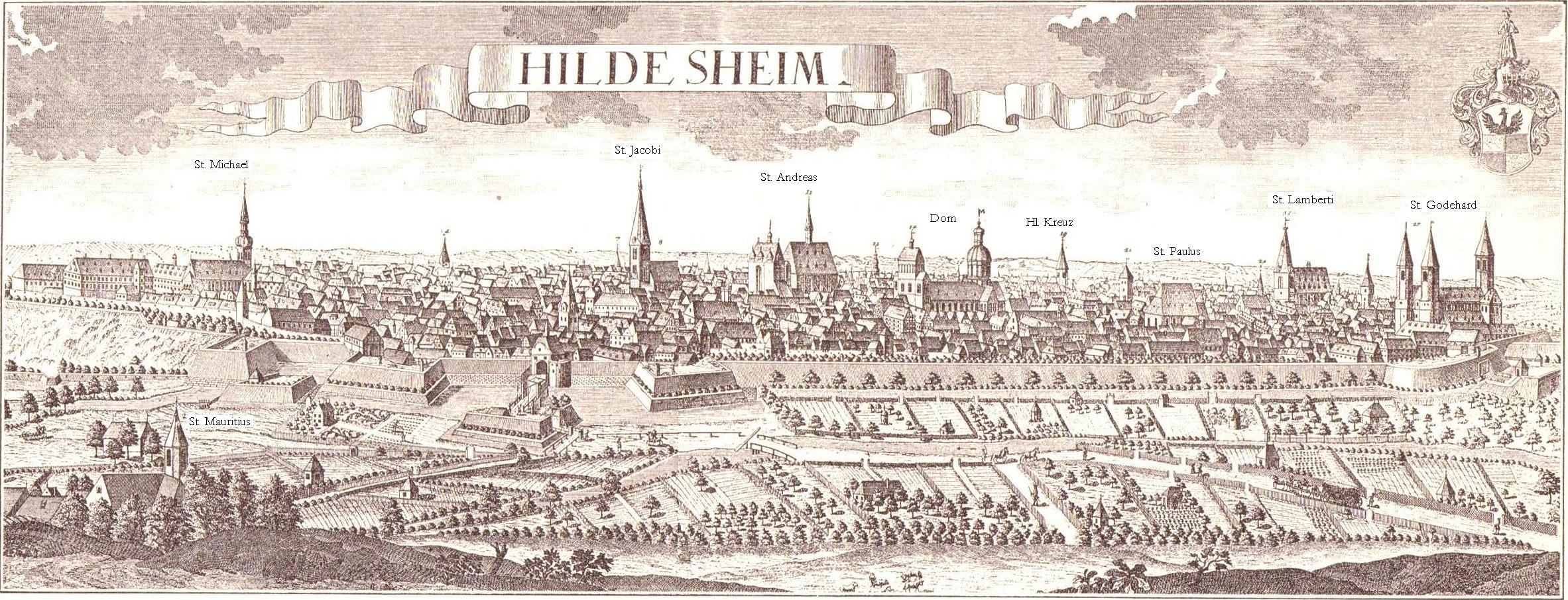 Ansicht von Hildesheim, Stich, 1729 (Jahresangabe von Bertram); Beschriftung Kirchen: Rabanus Flavus